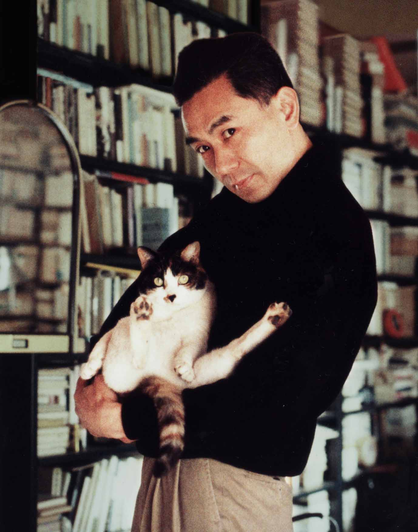 愛猫ノンと